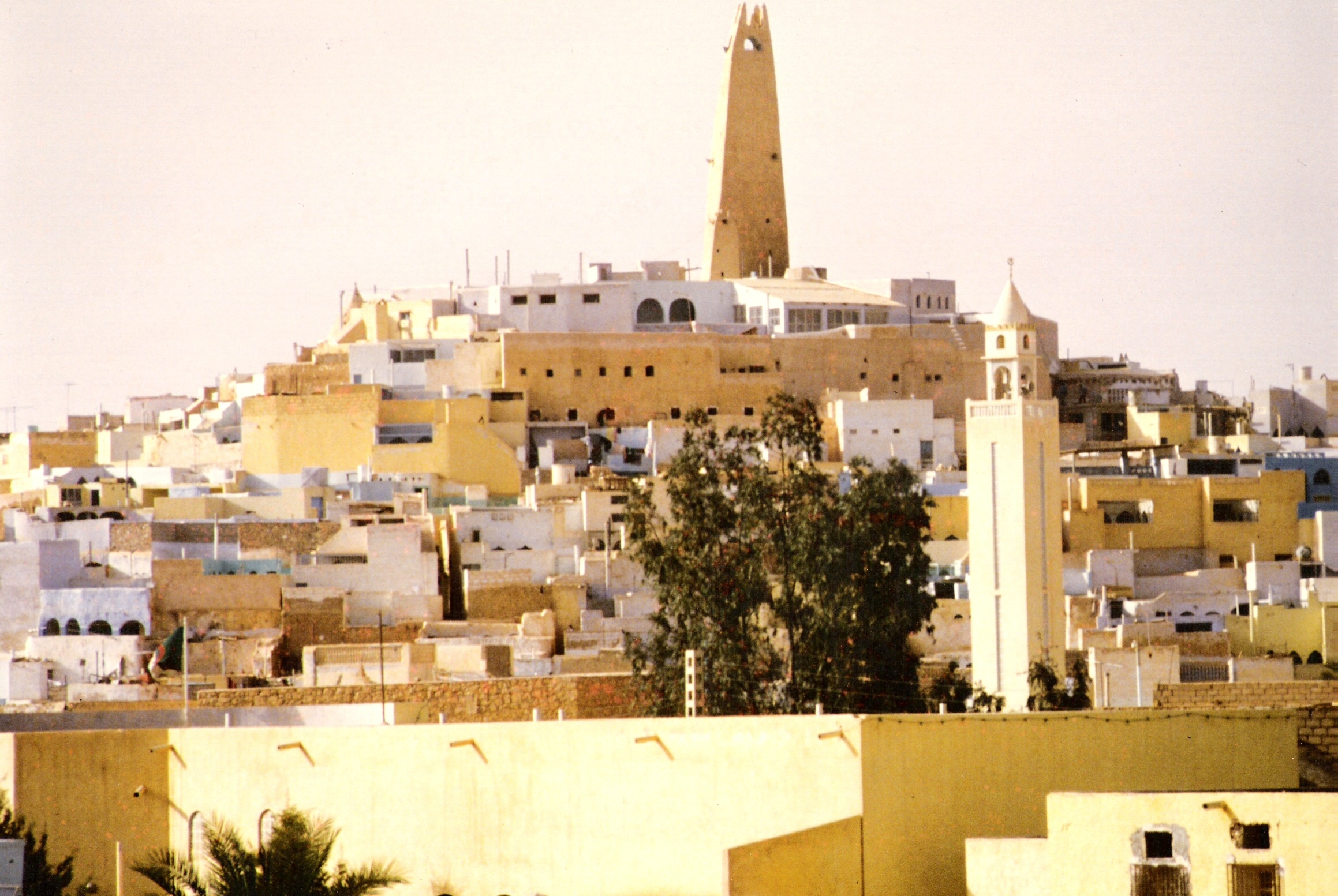 Ghardaia, Algerien